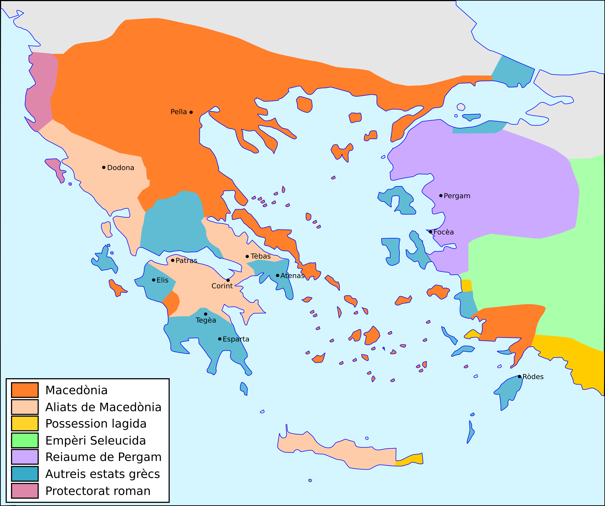 Situacion generala en Grècia en 200 avC.